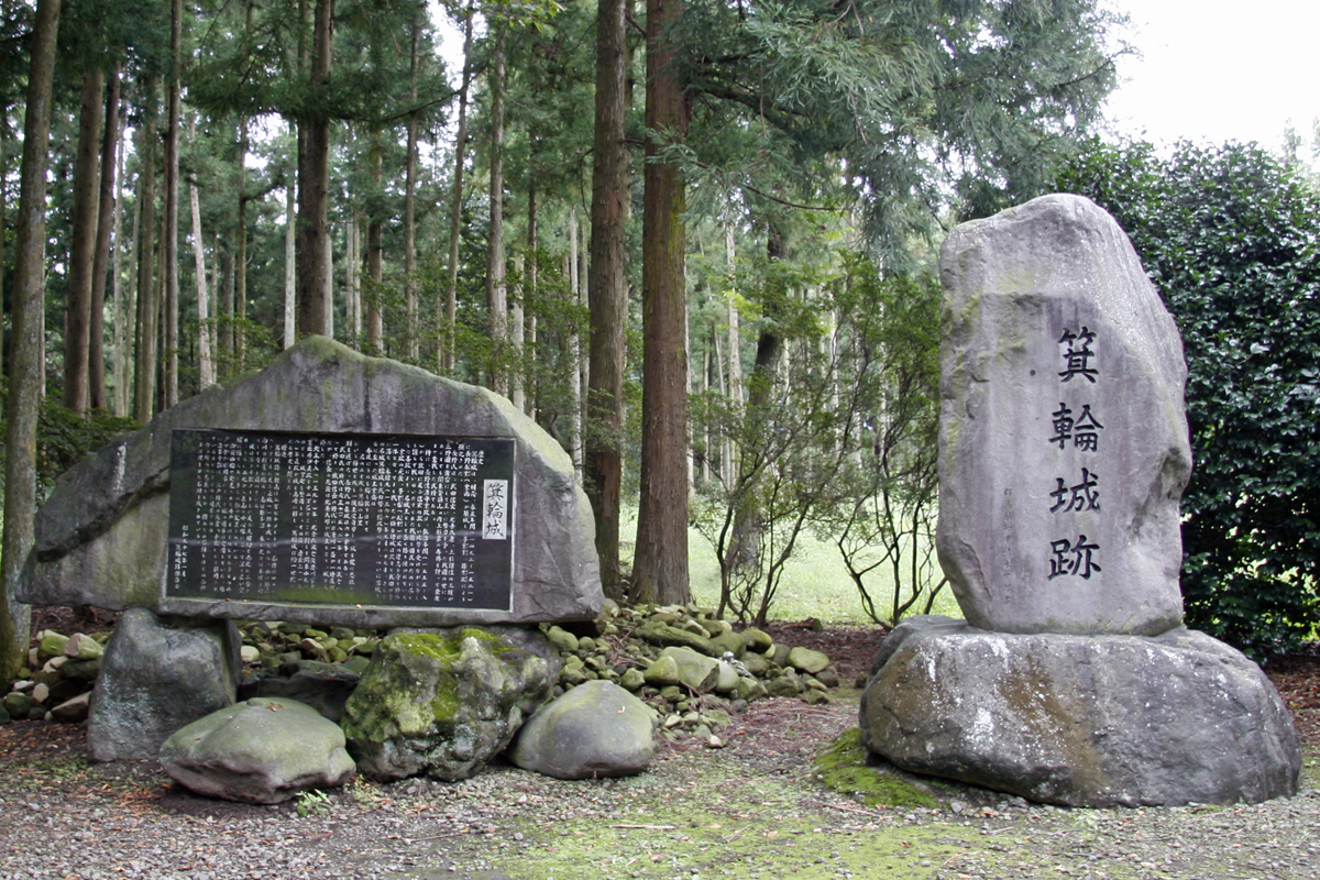 箕輪城（群馬県）、日本100名城